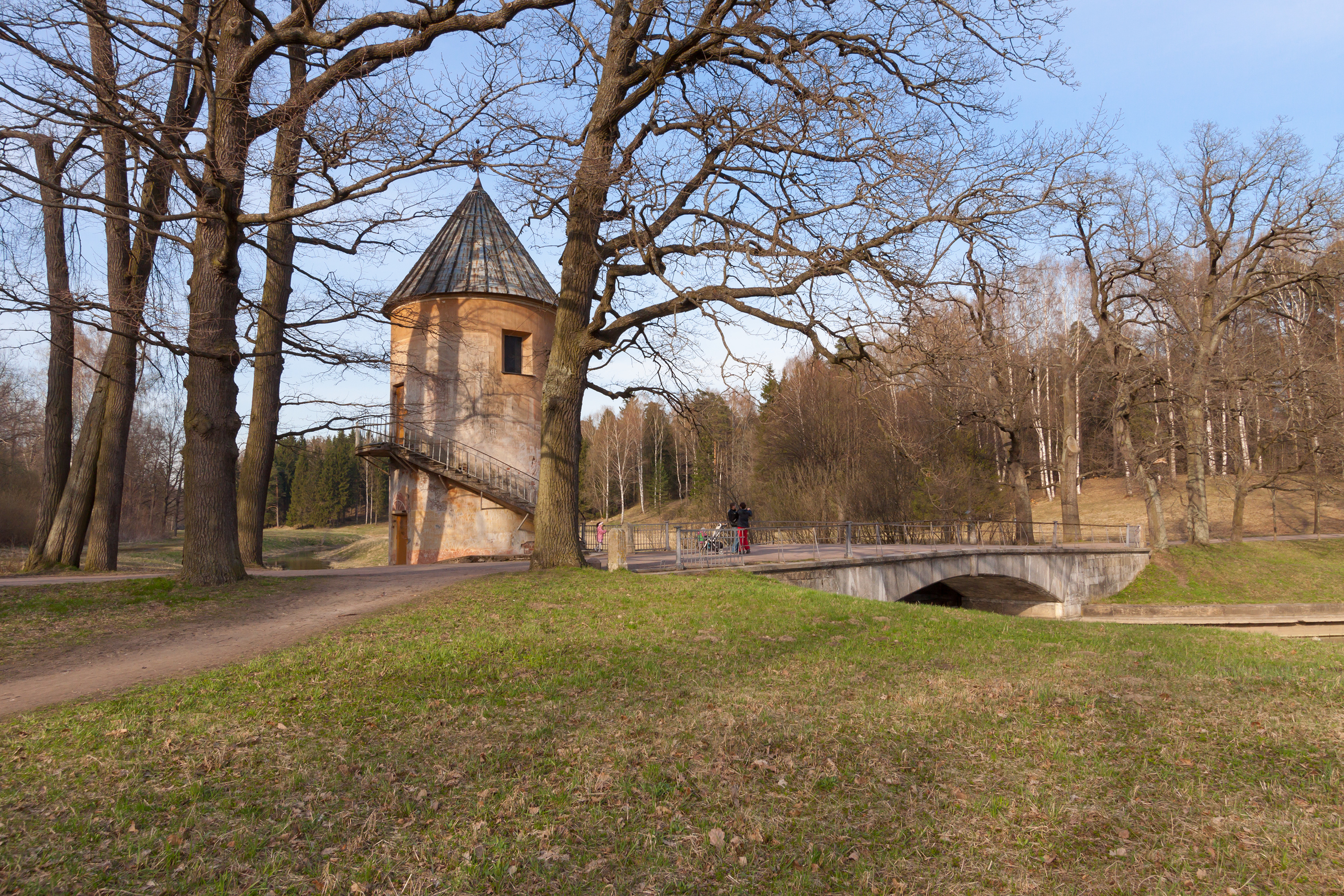 Пиль-башня: долина р. Славянки, Павловск, Пушкинский район, Санкт-Петербург